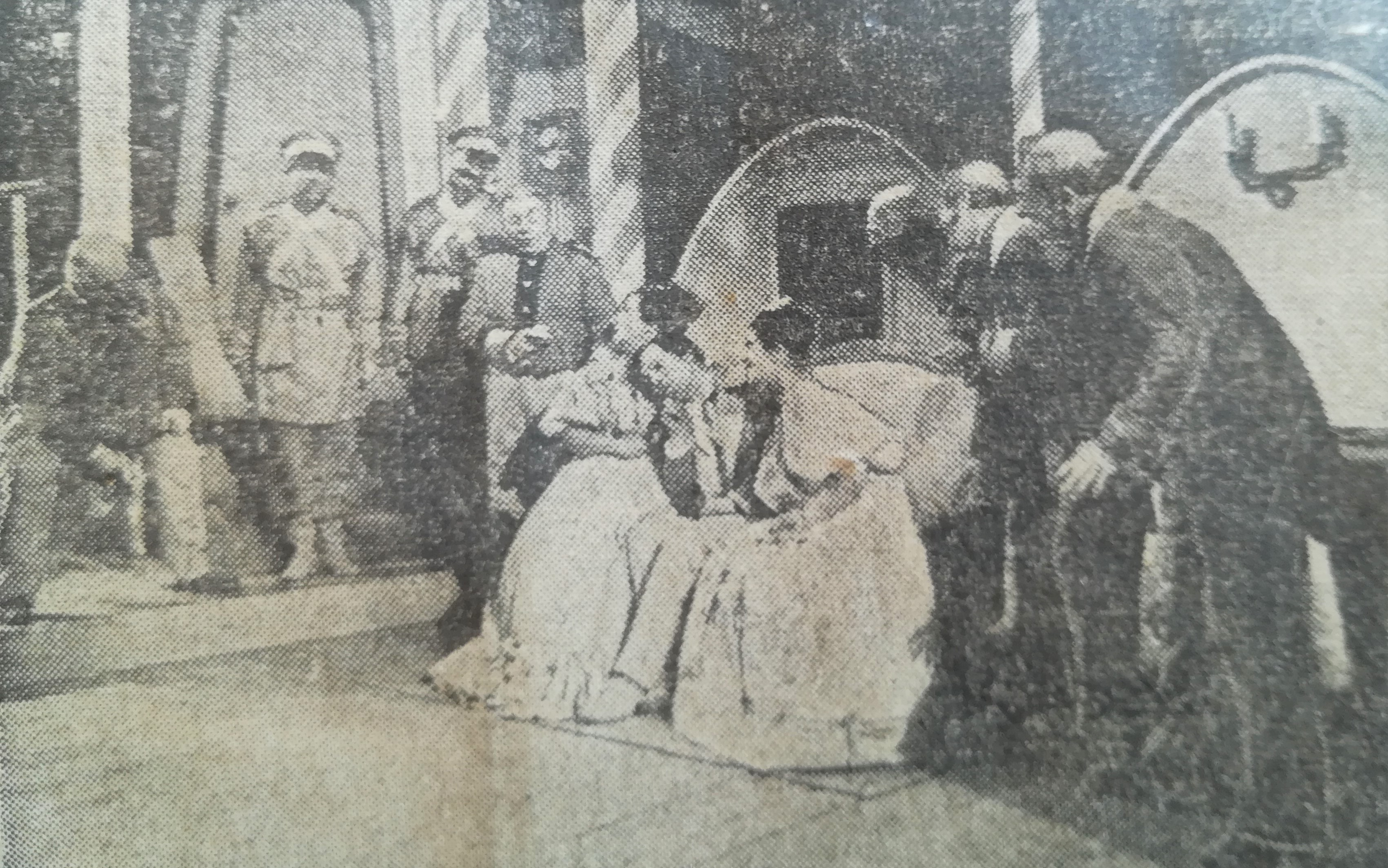 Rewizor Gogola w Teatrze Słowackiego w Krakowie w 1947 r.